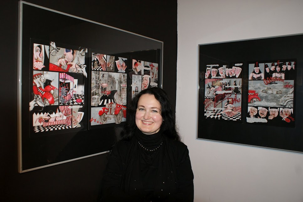 Aleksandra Spanowicz i jej prace, 13 stycznia 2011r. Studio BWA Wrocław, wernisaż wystawy Czas na komiks, fot. Piotr Machłajewski